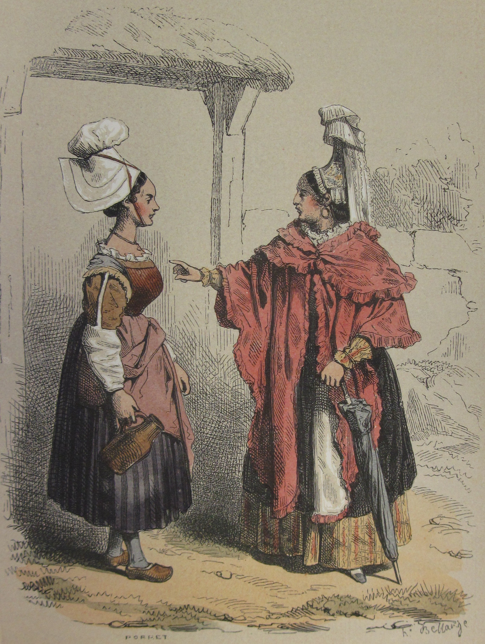 La Normandie par M. Jules Janin, illustrée par MM Morel-Fatio, Tellier, Gigoux, Daubigny, Debon, H. Bellangé, Alfred Johannot. Paris, Ernest Bourdin, éditeur, Rue de Seine, 51.] This is a faithful photographic reproduction of a two-dimensional, public domain work of art. The work of art itself is in the public domain for the following reason: This work is in the public domain in its country of origin and other countries and areas where the copyright term is the author's life plus 100 years or less. This work is in the public domain in the United States because it was published (or registered with the U.S. Copyright Office) before January 1, 1924. This file has been identified as being free of known restrictions under copyright law, including all related and neighboring rights. The official position taken by the Wikimedia Foundation is that "faithful reproductions of two-dimensional public domain works of art are public domain".This photographic reproduction is therefore also considered to be in the public domain in the United States. In other jurisdictions, re-use of this content may be restricted; see Reuse of PD-Art photographs for details.